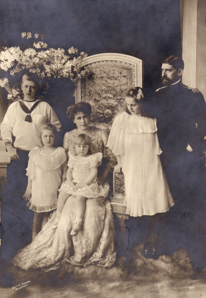 Король Румынии Фердинанд I с супругой и детьми, 1913